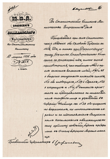 Документ, характеризующий состояние губернской статистики, подписанный орловским губернатором Валерианом Ивановичем Сафоновичем